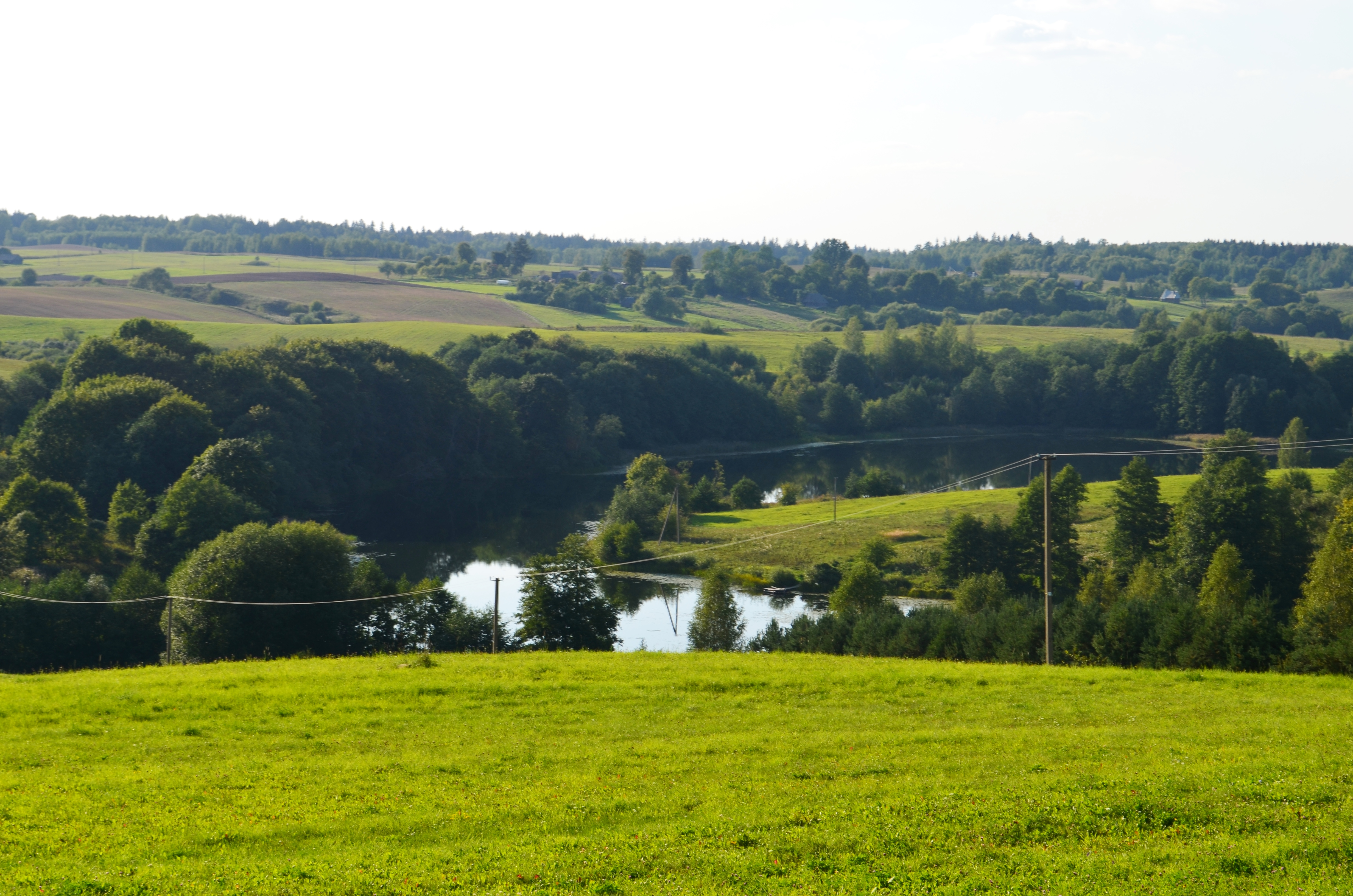 Strėvaičio ežeras, Trakų raj.